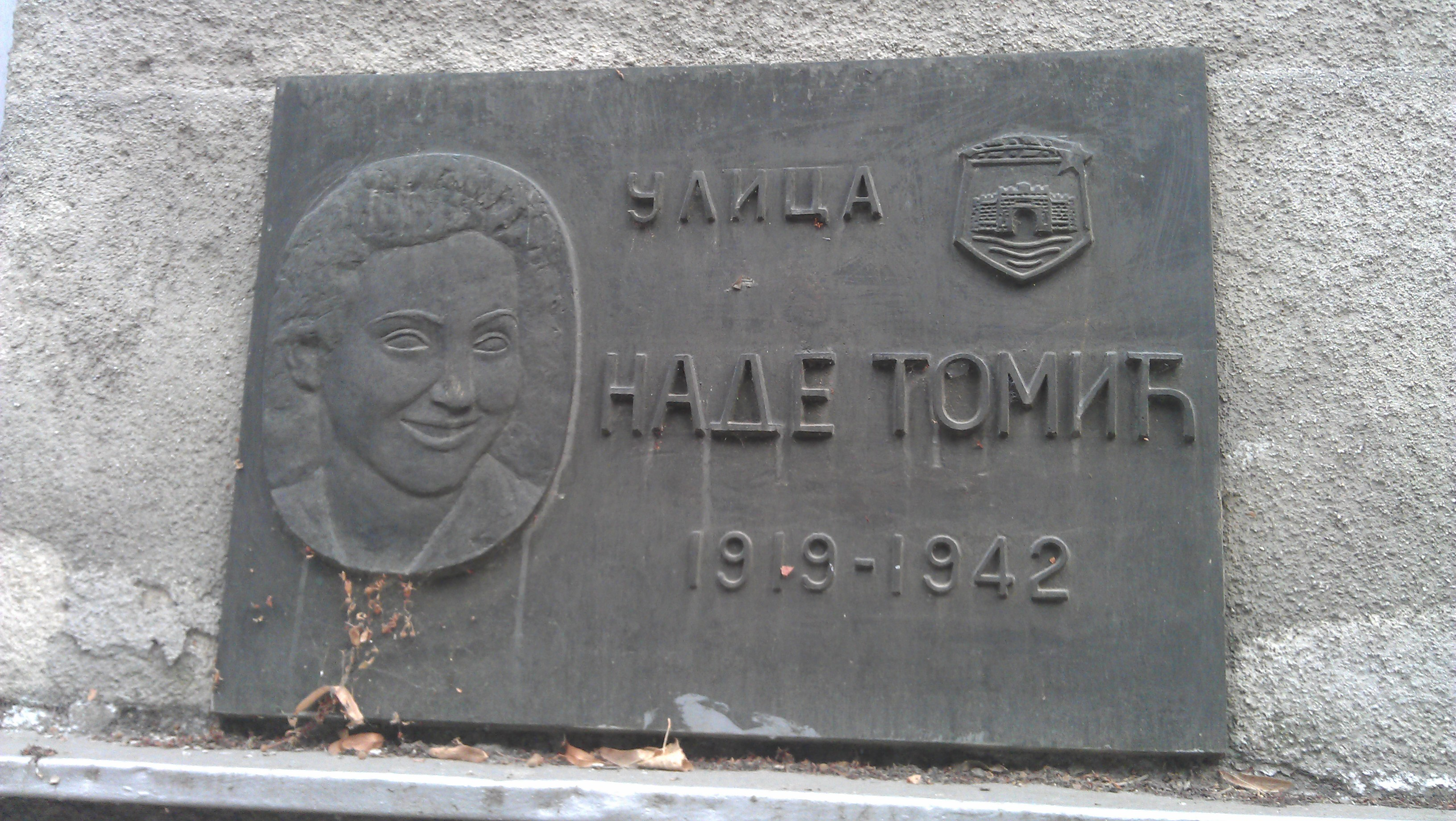 Ulica Nade Tomić Niš. Snimljeno mobilnim telefonom.